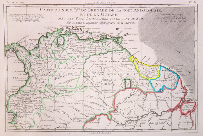 Carte du Nouv. Rme. de Grenade, del Noule Andalousie, et de la Guyane, avec les Pays limitrophes qui en sont au Sud